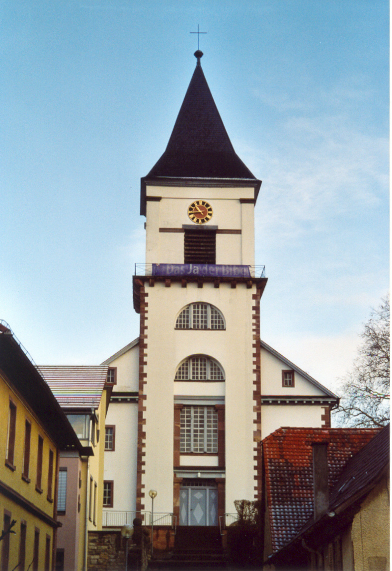 Wössingens Kirche im Weinbrenner-Stil, erbaut 1817-22 nach Entwurf von Friedrich Theodor Fischer.